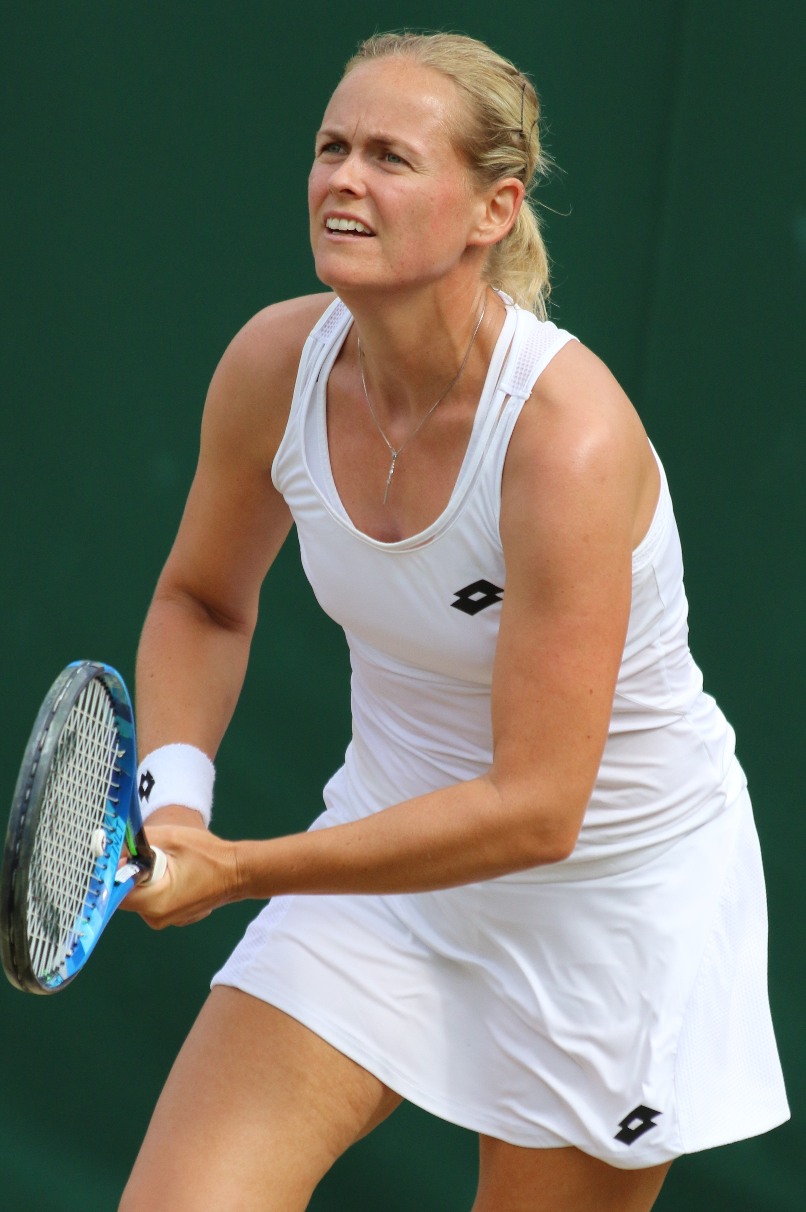 Groenefeld WM17 (1)